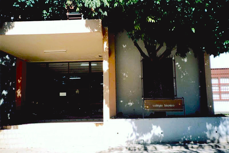 Uma das entradas do Colégio Técnico da UFMG.